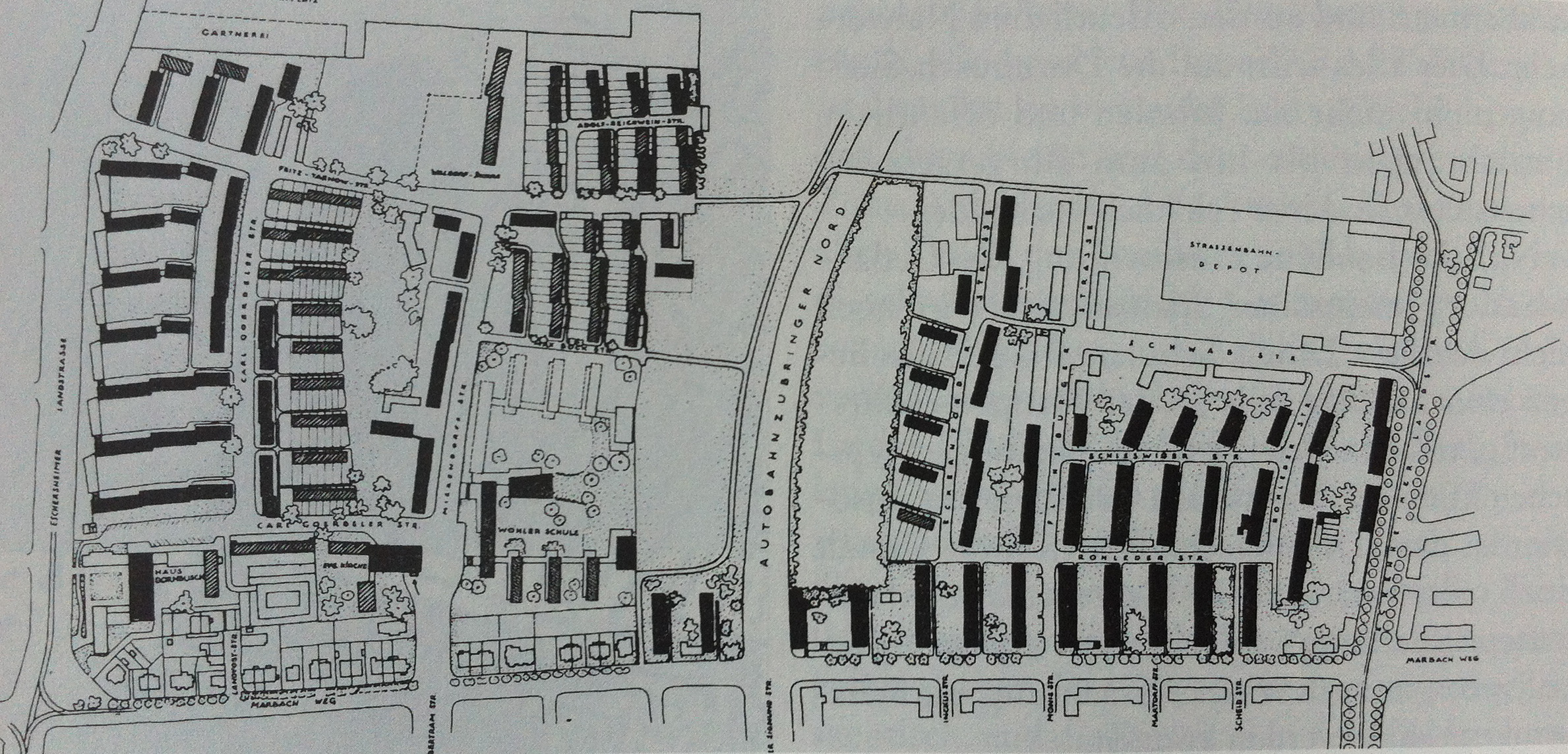 Lageplan der Dornbusch-Siedlung in Frankfurt-Dornbusch aus den 1950er Jahren